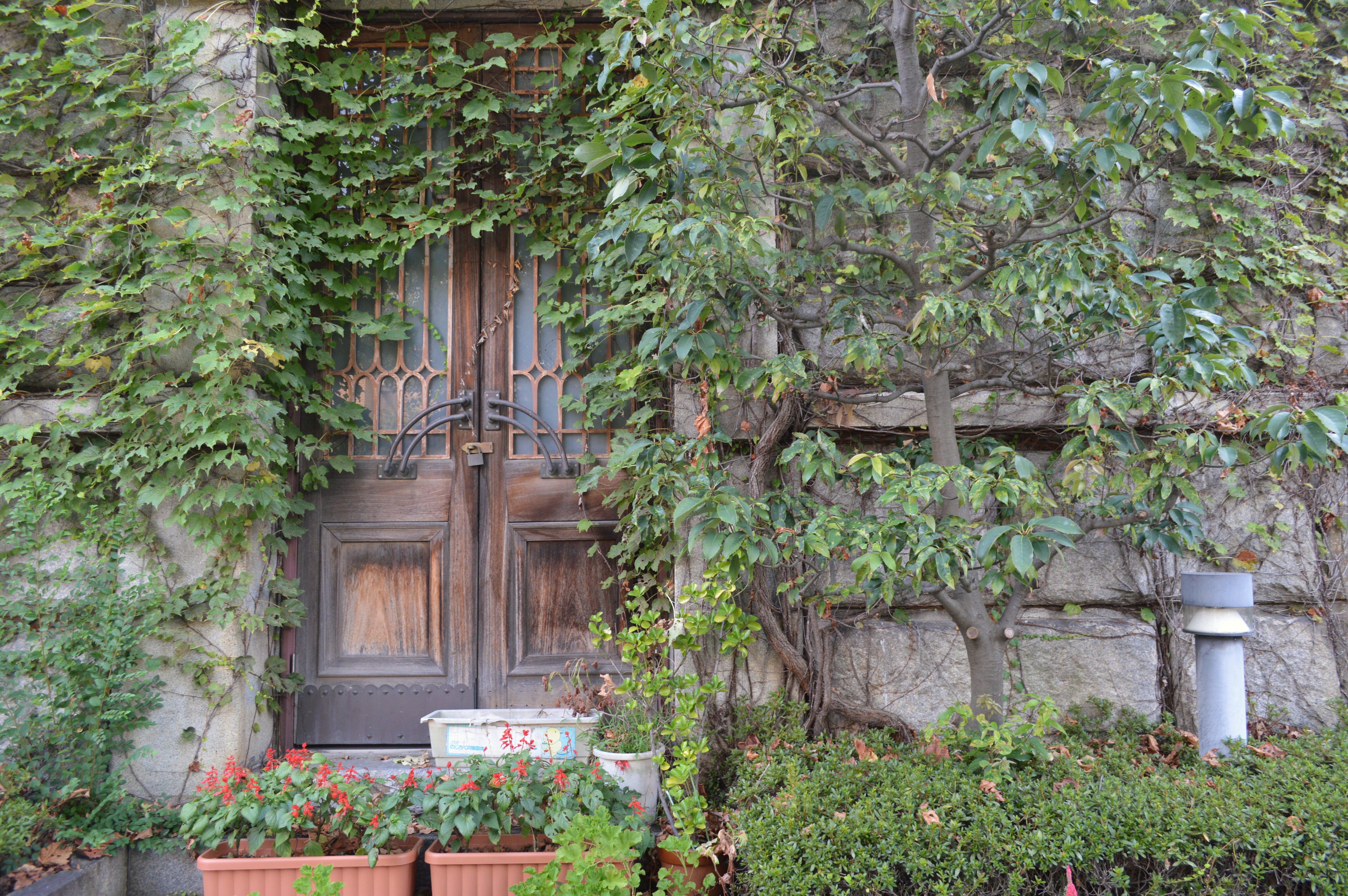 芦屋市立図書館打出分室（旧芦屋市立図書館本館）。